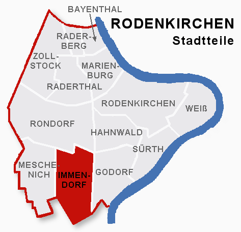 Lage des Stadtteils Immendorf im Stadtbezik Rodenkirchen